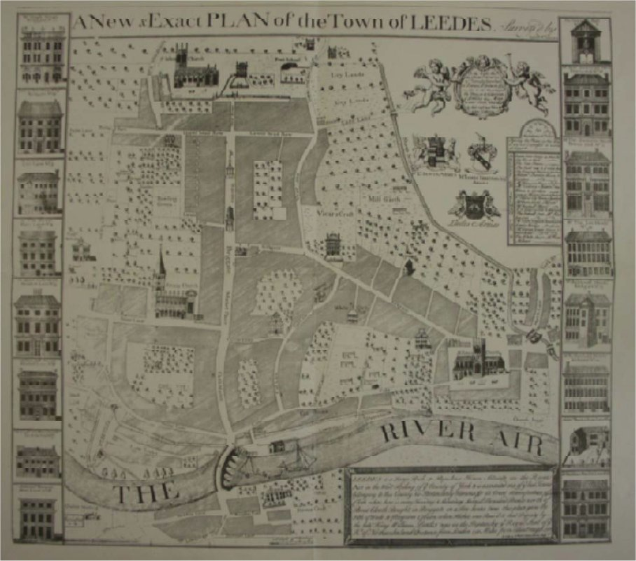 Leeds map, 1725